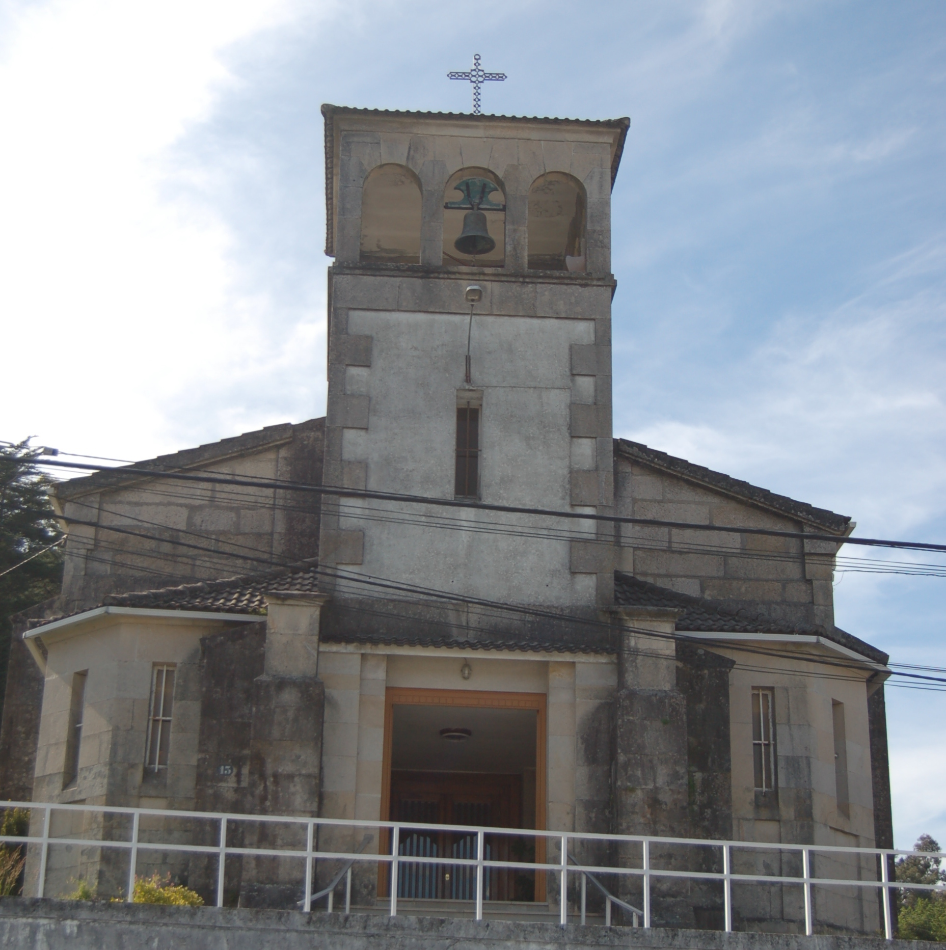 Capela do Sagrado Corazón en Ponte Caldelas